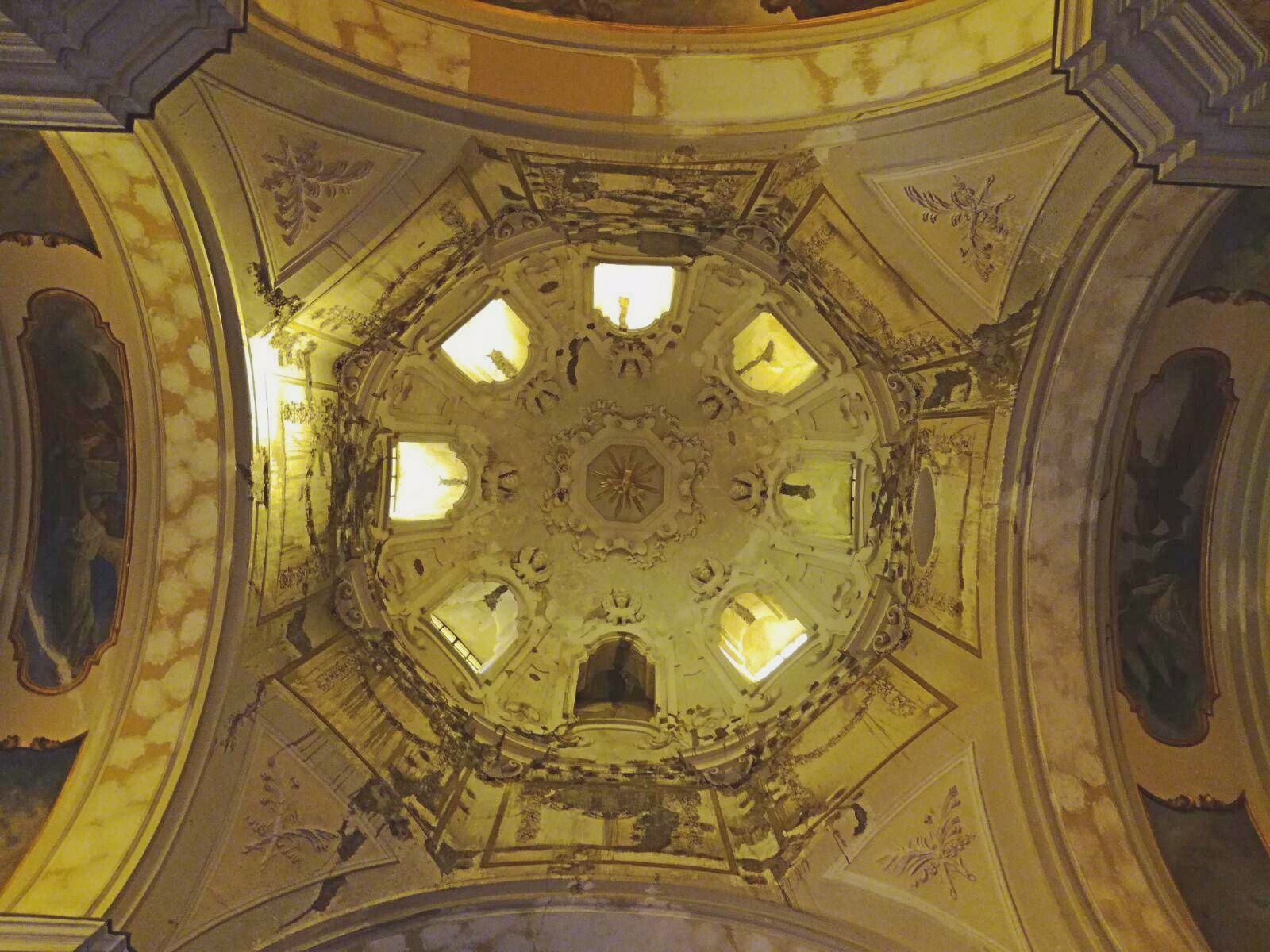 Cupola Michele Arcangelo